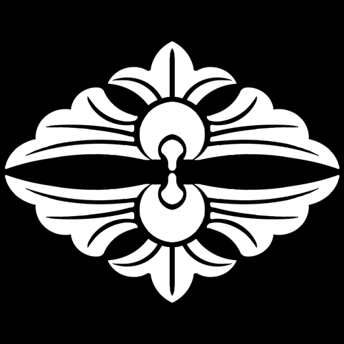 「向かい雀」紋（染抜）